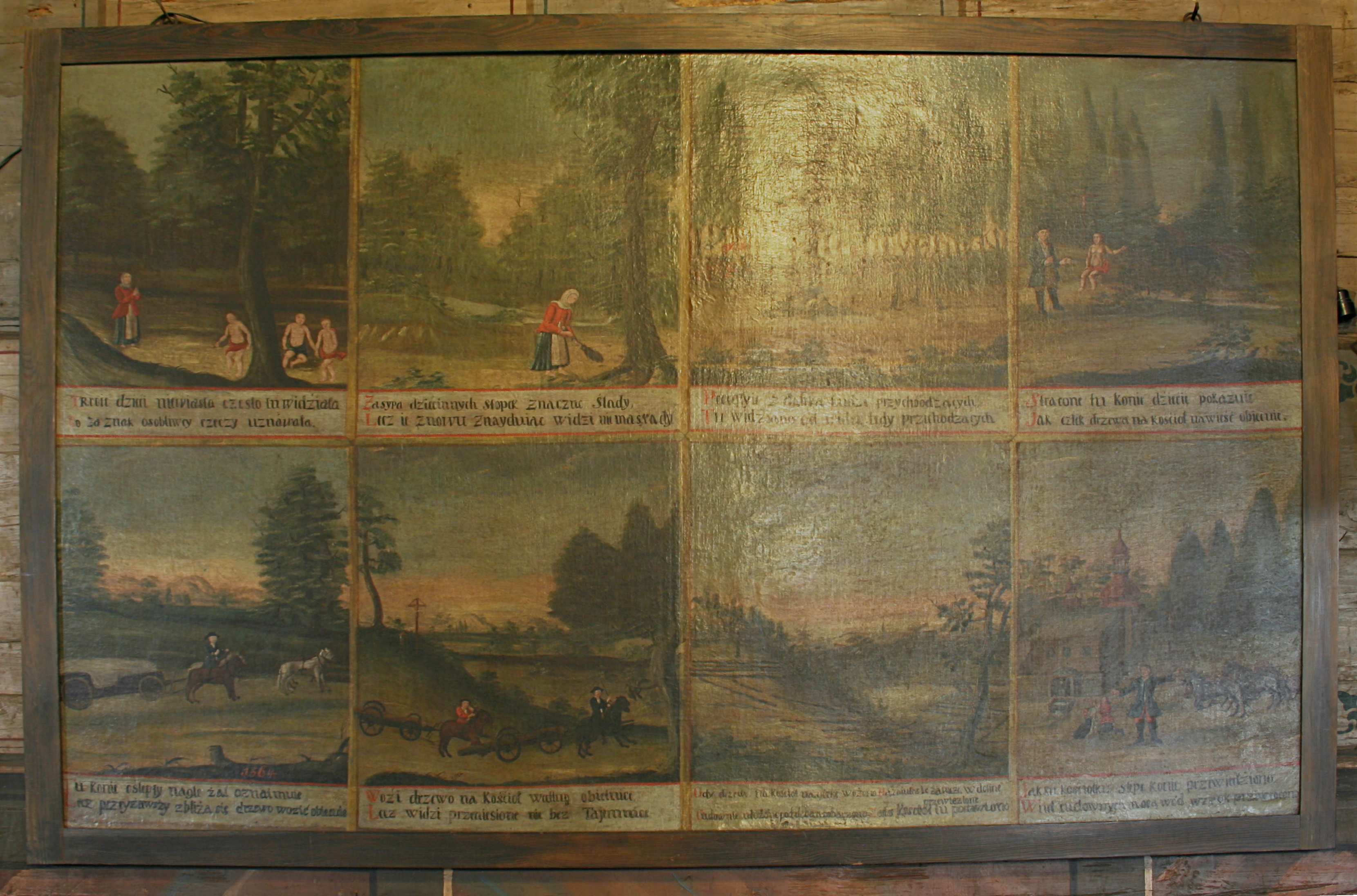 Legenda o kościele św. Trójcy - Historia powstania kościoła na obrazach z XIX wieku w tymże kościele.